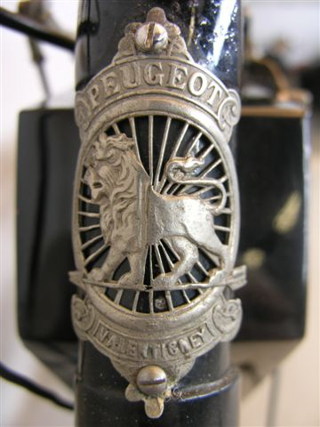 Bron: Classic Motorcycle Archive.